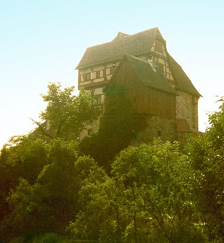 Altensteig - Schloss (in Wirklichkeit ist es nur ein gut ausgebautes Patrizierhaus)